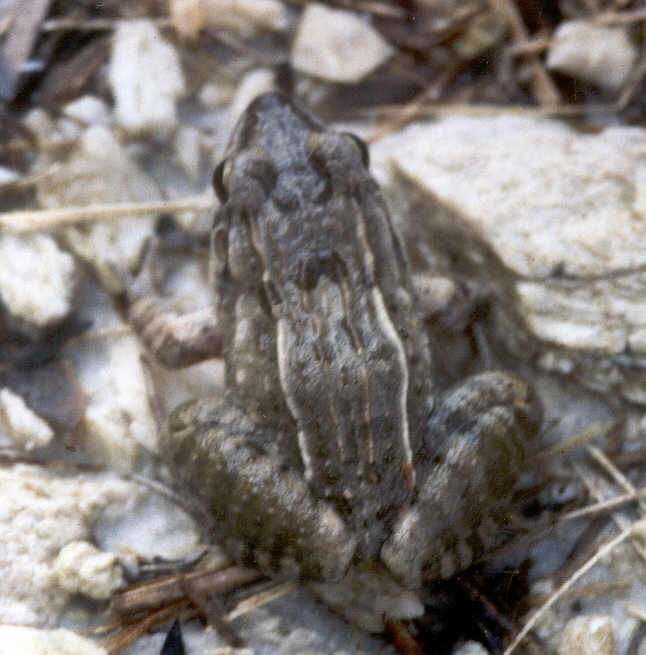 Leptodactylus fuscus